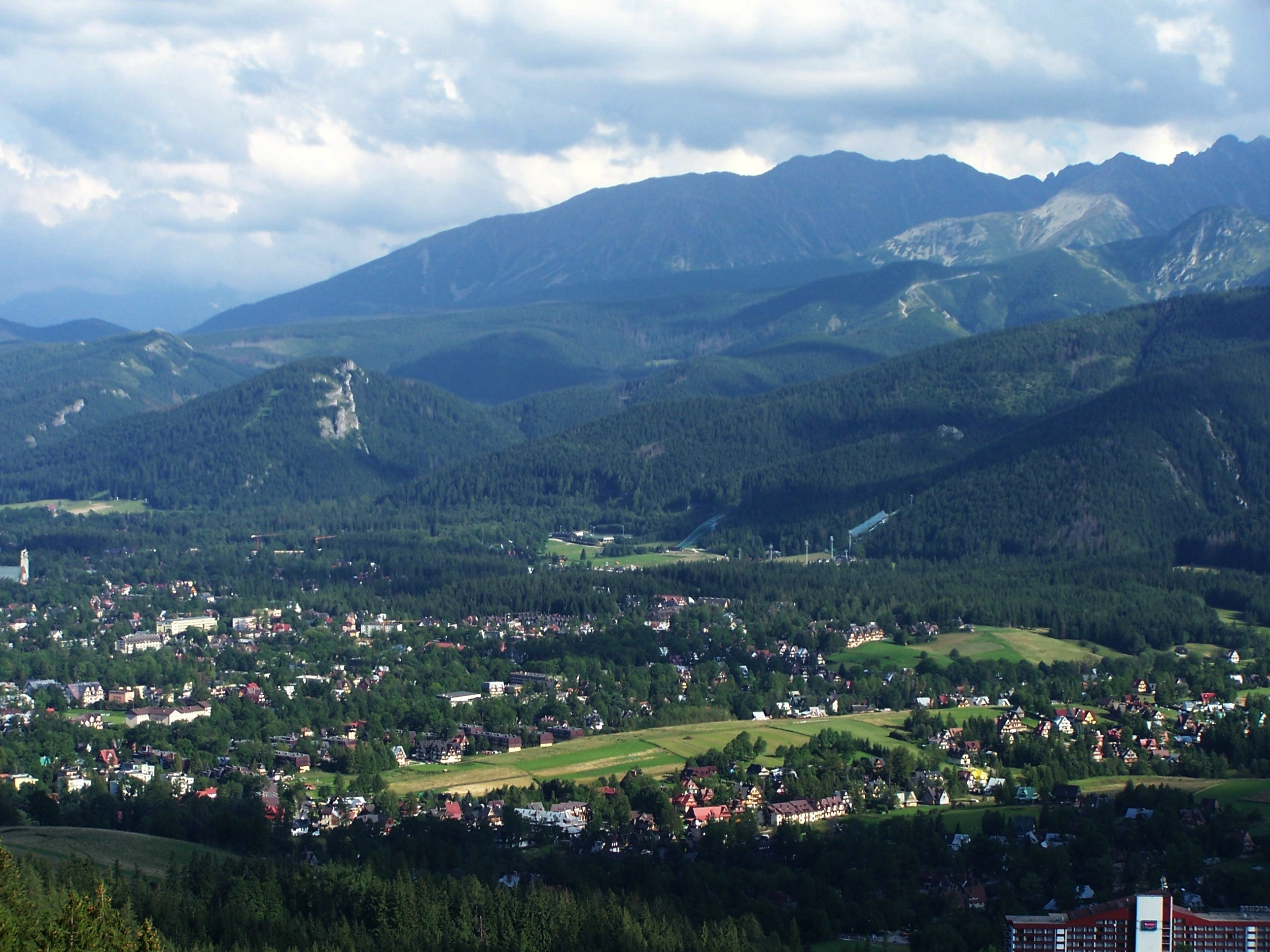 Widok z Butorowego wierchu na Tatry i Zakopane